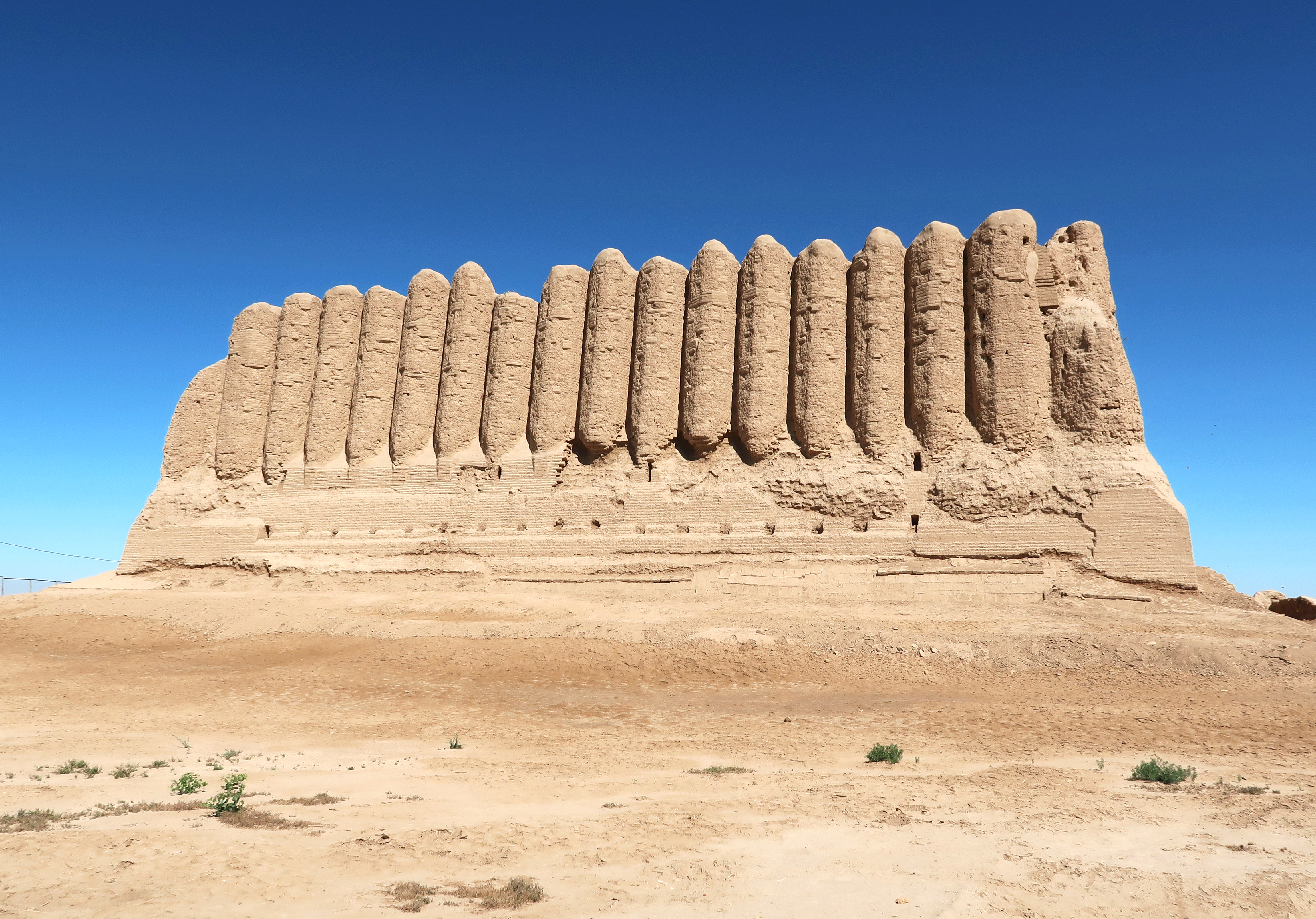 Ancient Merv